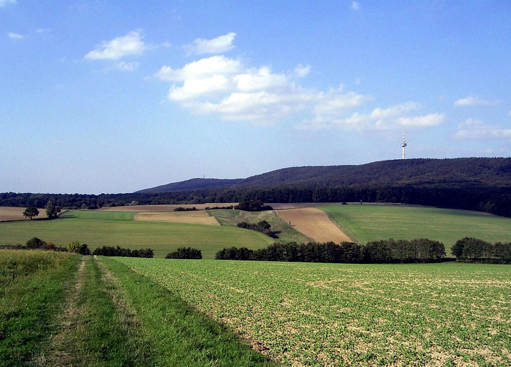 Deister - Westseite bei Lauenau